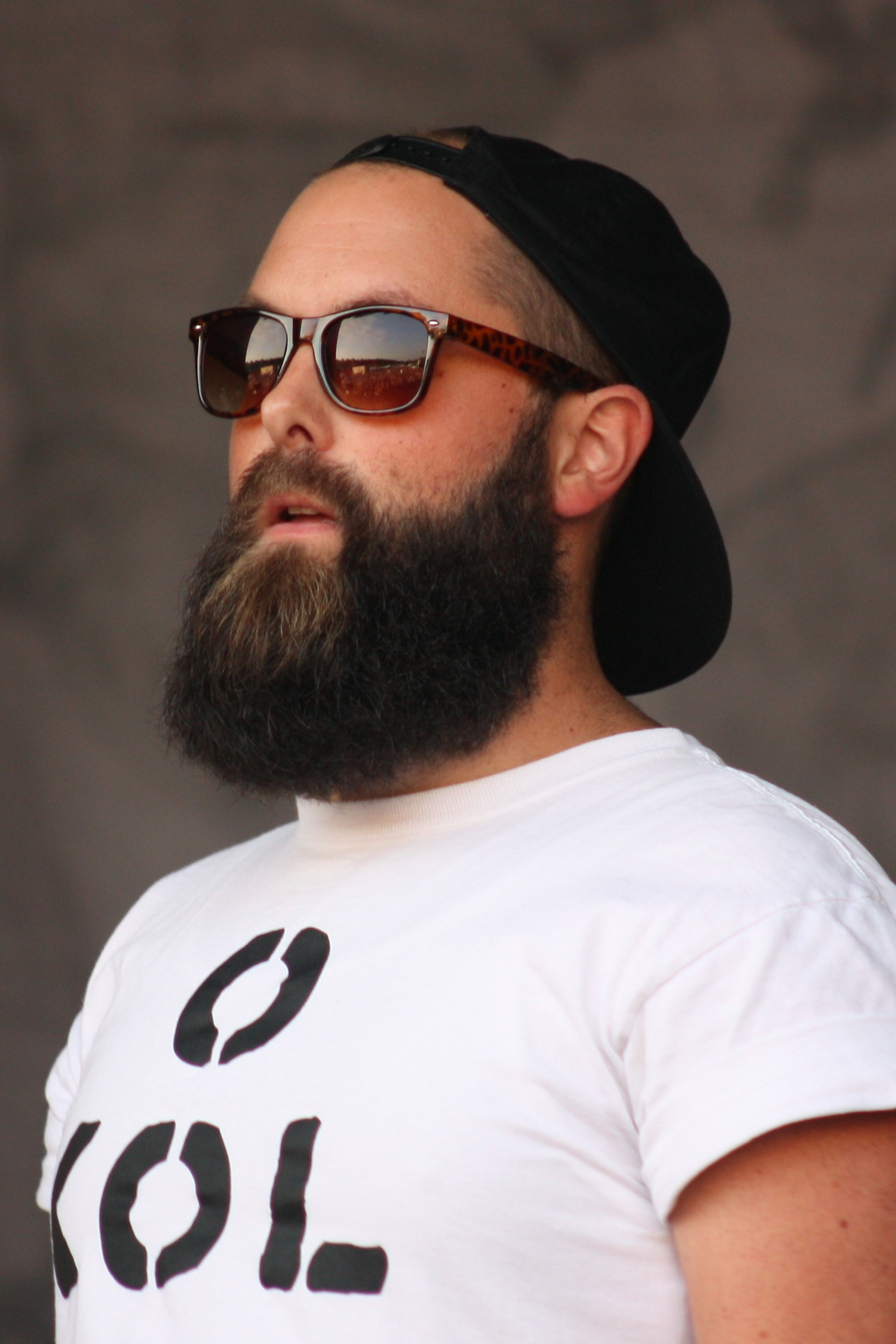 Folklore 013 in Wiesbaden, Auftritt der Gruppe Frittenbude